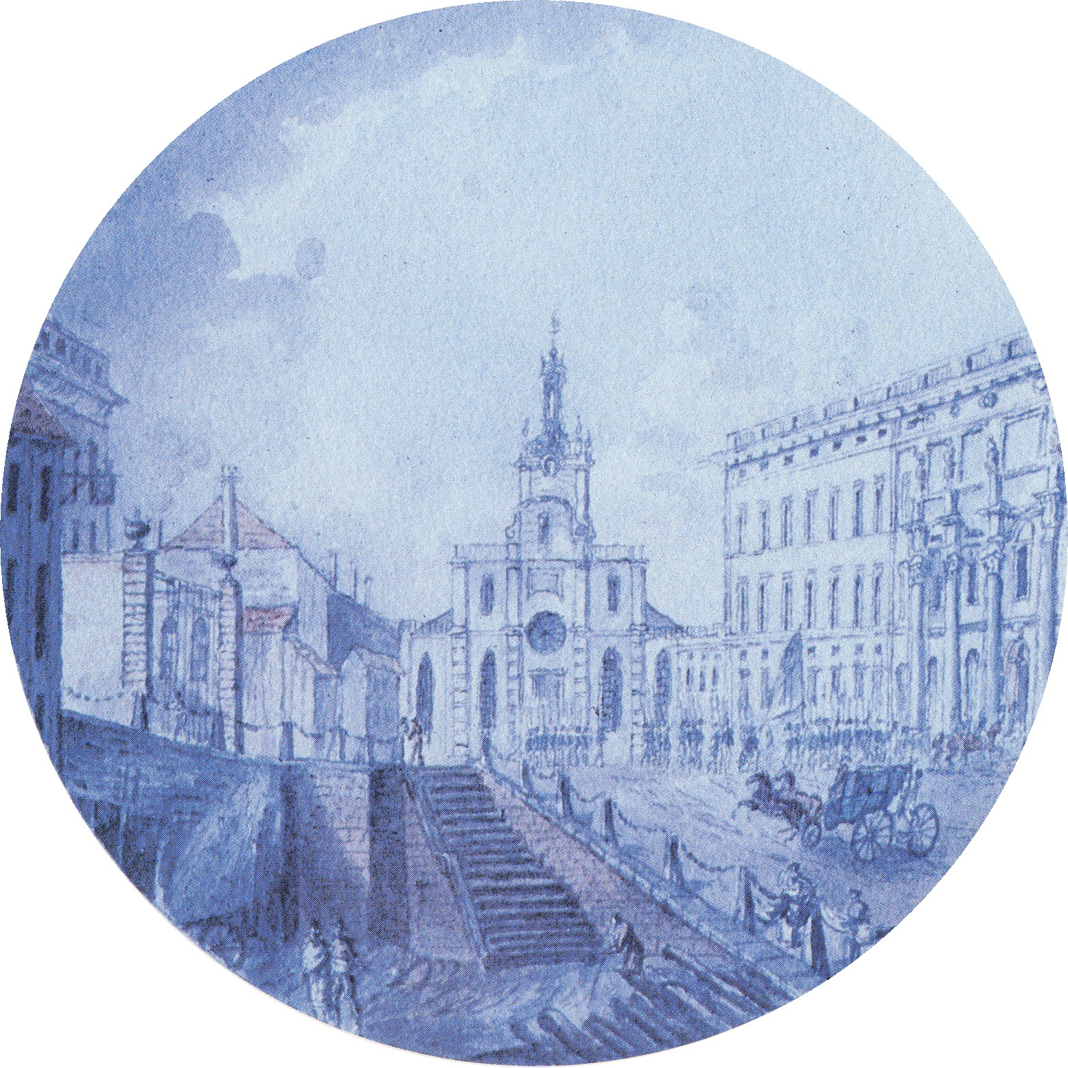 Stora Bollhuset vid Slottsbacken i Stockholm. Byggnader från höger till vänster: Stockholms slott, Storkyrkan Stora Bollhuset (med röd tegeltak) och Tessinska palatset, bilden är beskuren